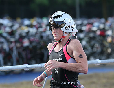 Mary beth Ellis Ironman Germany 2014